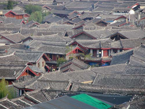 Tejados del Lijiang antiguo